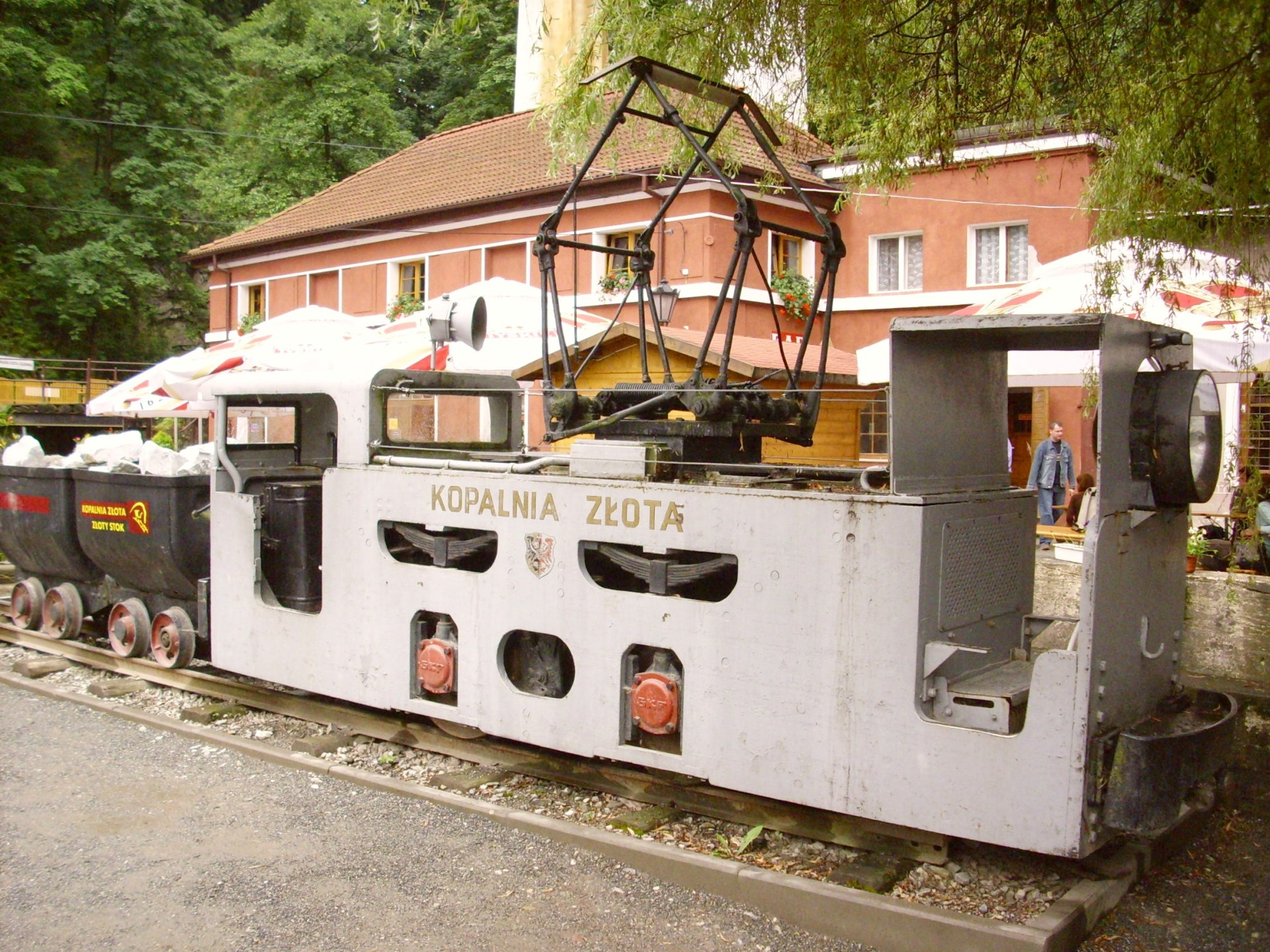 Elektryczna lokomotywka kopalniana ustawiona przed wejściem do Kopalni Złota w Złotym Stoku (woj. dolnośląskie).